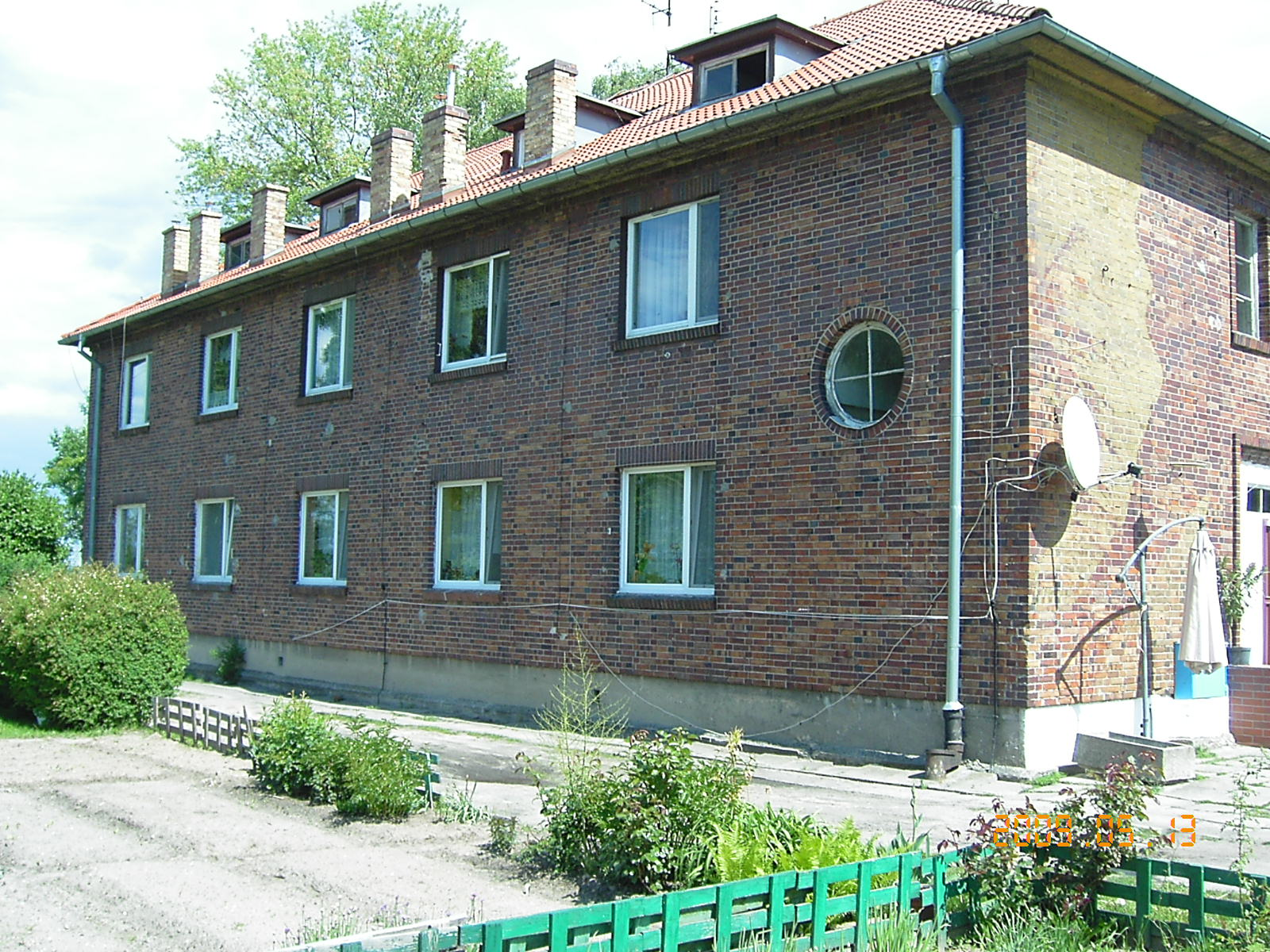 Byłe koszary WOP przy ulicy Przestrzennej w Szczecinie